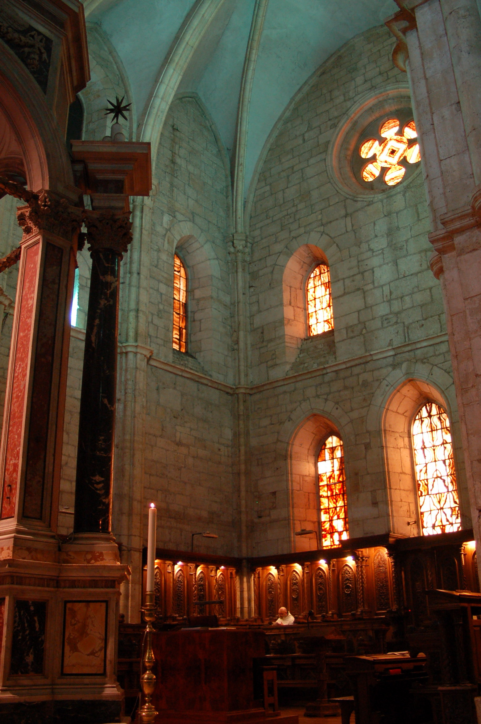 Il coro dell'Abbazia di Casamari (Veroli - Frosinone - Italia)